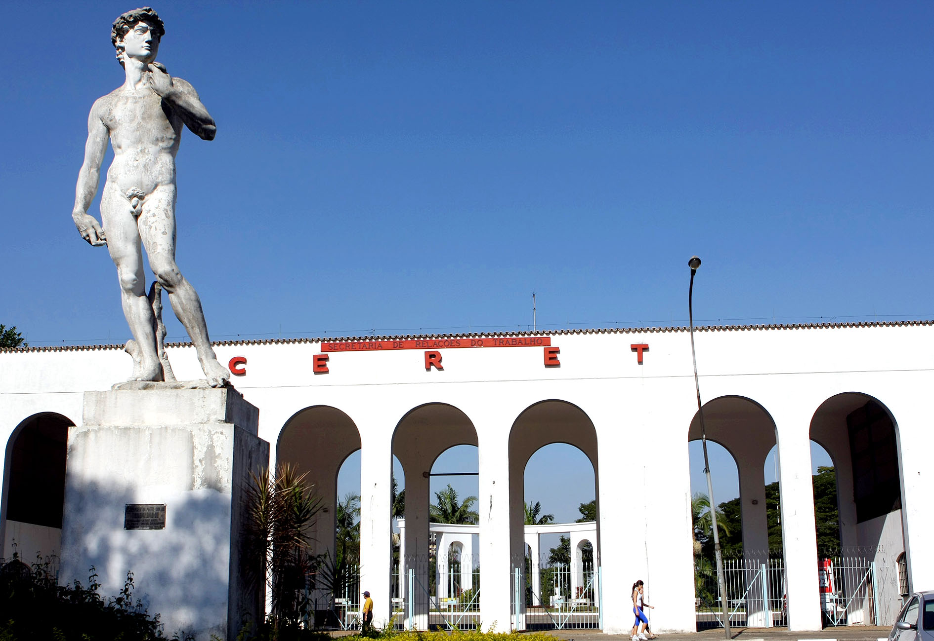 Centro Esportivo, Recreativo e Educativo do Trabalhador (CERET), São Paulo